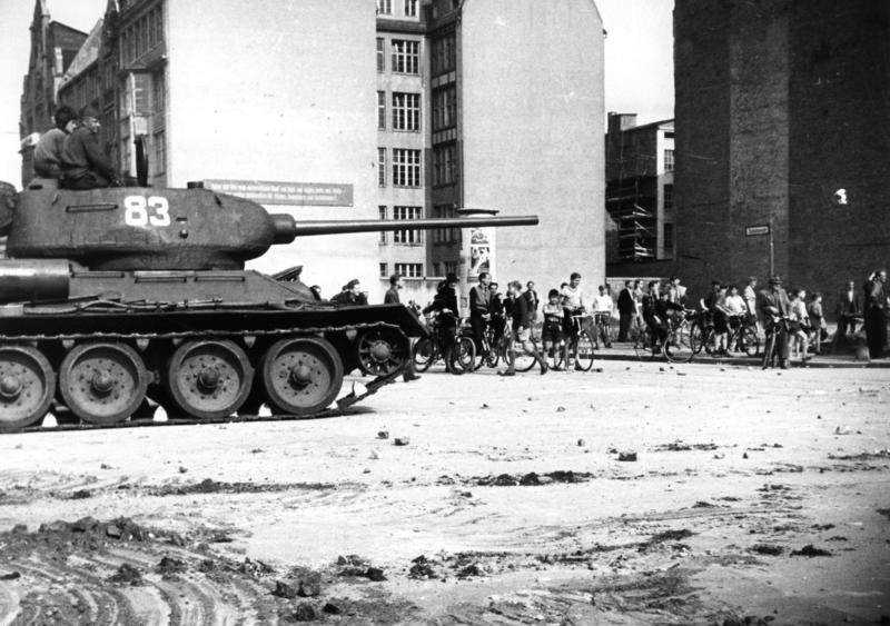 17. Juni 1953 Aufstand im Sowjet-Sektor von Berlin Nach dem Tode Stalins griff der Wille zur Selbstbestimmung über das staatliche und persönliche Leben und über die Freiheit der Persönlichkeit auf die Menschen des gesamten sowjetzonalen Sektors Deutschlands über. Die Bevölkerung im Sowjetsektor Berlins glaubte die Stunde der Freiheit sei für sie gekommen. Man ging auf die Straßen und proklamierte das Recht auf Freiheit und Selbstbestimmung. Der Aufstand wurde durch sowjetische Truppen zusammengeschlagen Von der sowjetischen Besatzungsmacht eingesetzte Panzer zur Niederschlagung der Unruhen in der Schützenstrasse.